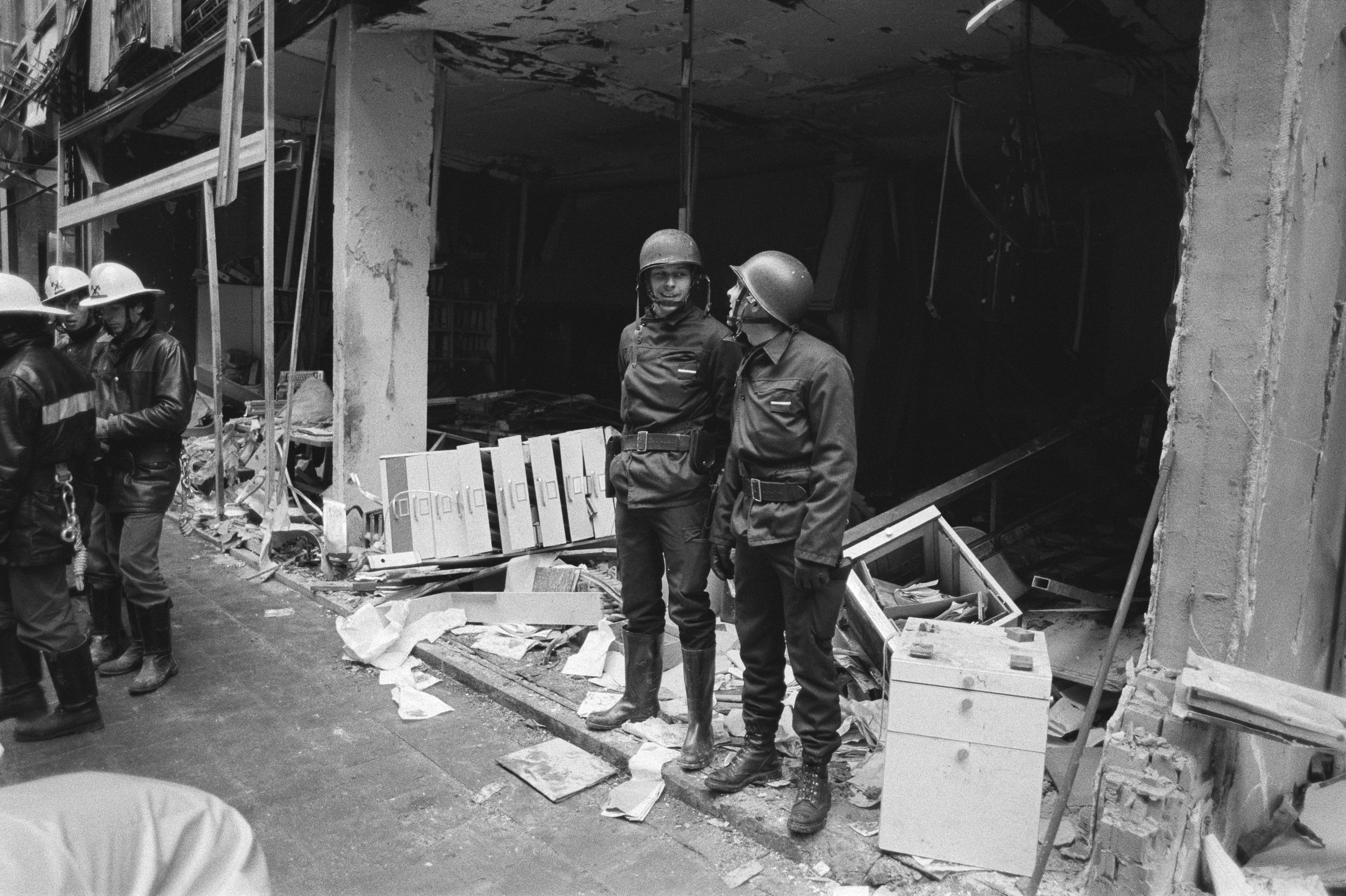 Collectie / Archief : Fotocollectie Anefo Reportage / Serie : Bomaanslag in de Joodse wijk van Antwerpen Beschrijving : Grote ravage na de aanslag Datum : 20 oktober 1981 Locatie : Antwerpen, België Trefwoorden : beschadigingen, gebouwen, reddingswerkers Fotograaf : Antonisse, Marcel / Anefo Auteursrechthebbende : Nationaal Archief Materiaalsoort : Negatief (zwart/wit) Nummer archiefinventaris : bekijk toegang 2.24.01.05 Bestanddeelnummer : 931-7517